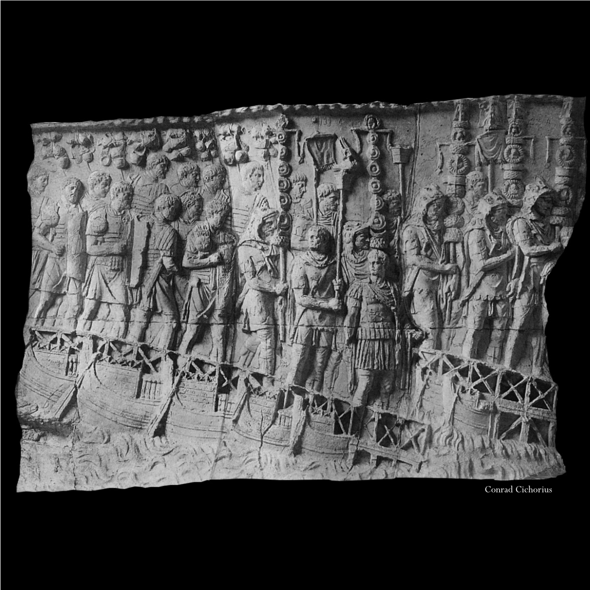 Moulage de la frise de la colonne Trajane, exposé au Museo della Civiltà Romana, Rome.